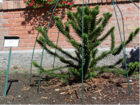 Chilei araukária (Szabadegyháza Község Arborétuma)